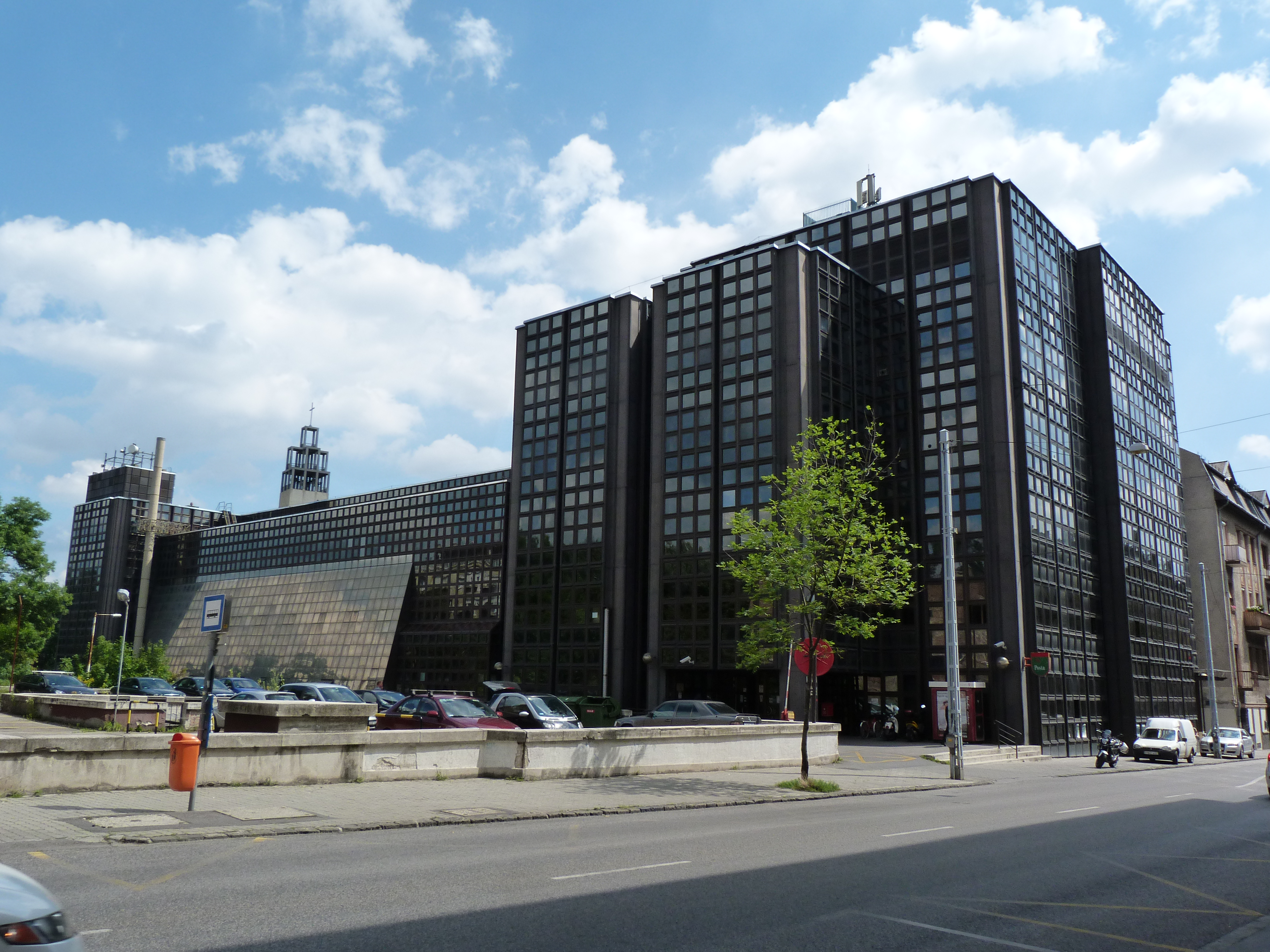 A felvétel 2014. augusztus 15-én pénteken készült Budapesten. Budai Központi Kézbesítő Posta. ©© Derzsi Elekes Andor, Budapest 2014, You are authorised to use these photos and vids under Creative Commons – even for commercial, for profit purposes. Photos must be attributed to Derzsi Elekes Andor. All of the photos and vids in the Metapolisz DVD line are under Creative Commons and can be used even for commercial – for profit – purposes. Recommended Citation Derzsi Elekes Andor: Metapolisz DVD line